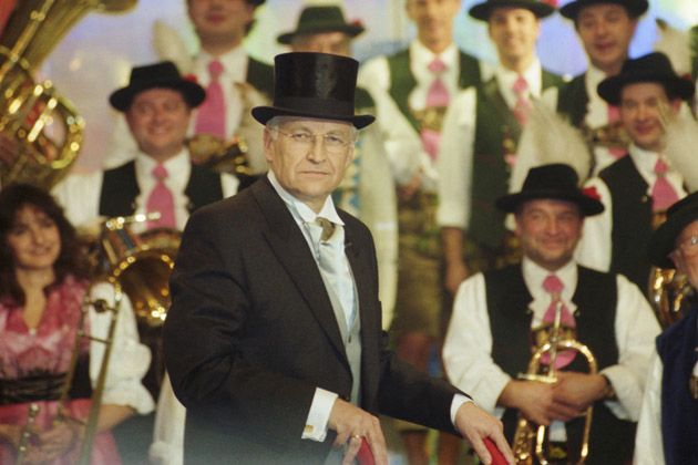 Edmund Stoiber während der Verleihung des Orden wider den tierischen Ernst des Aachener Karnevalsvereins, März 2000